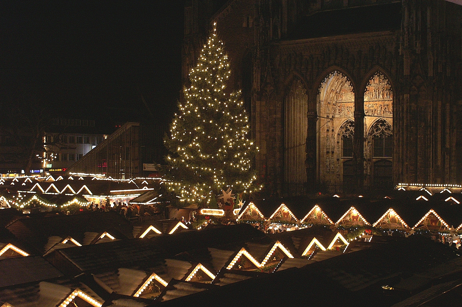 Ulmer Weihnachtsmarkt